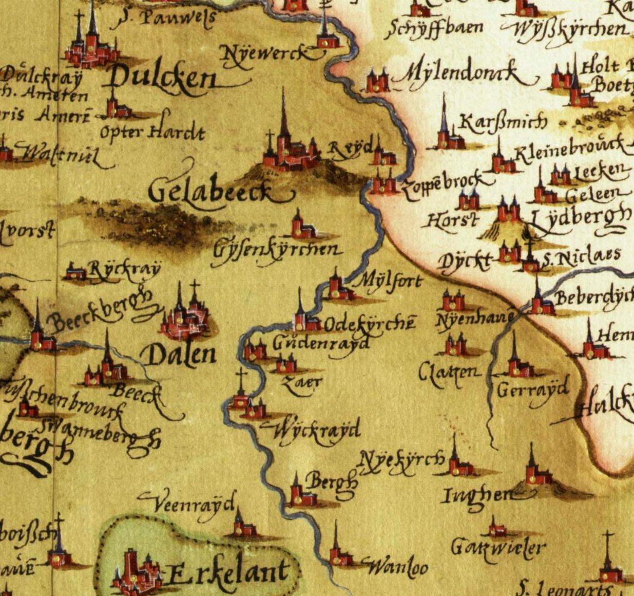 Zu sehen ist das heutige Mönchengladbach in einer Landkarte aus dem Atlas Bruxellensis von Christian Sgrooten (1532 - 1608) aus dem Jahr 1573. Zu sehen ist eine Stadtansicht von Mönchengladbach (Gelabeeck), die Niers bis weit hinter Wanlo (Wanloo) und der heutige Hardterwald zwischen Rheindahlen (Dalen) und Hardt (Opter Hardt). Gladbach ist in der Karte etwa zu südlich dargestellt und liegt versehentlich südwestlich von Rheydt (Reydt). Zu sehen sind außerdem Neuwerk (Nyewerck), Zoppenbroich (Zoppebrock), Horst (Haus Horst), Mülfort (Mylfort), Odenkirchen (Odekyrche), Güdenrayd (Güdderath), Zaer (Saarhof), Wickrath (Wyckrayd) und Wickrathberg (Bergh). Am Kartenrand befinden sich noch Erkelenz (Erkelant) und Dülken (Dulcken). Fast ganz Mönchengladbach gehört zum Herzogtum Jülich. Zoppenbroich, Giesenkirchen und Schelsen liegen im Kurfürstentum Köln. Erkelenz gehört als einzige Stadt den Spanischen-Niederlanden an.